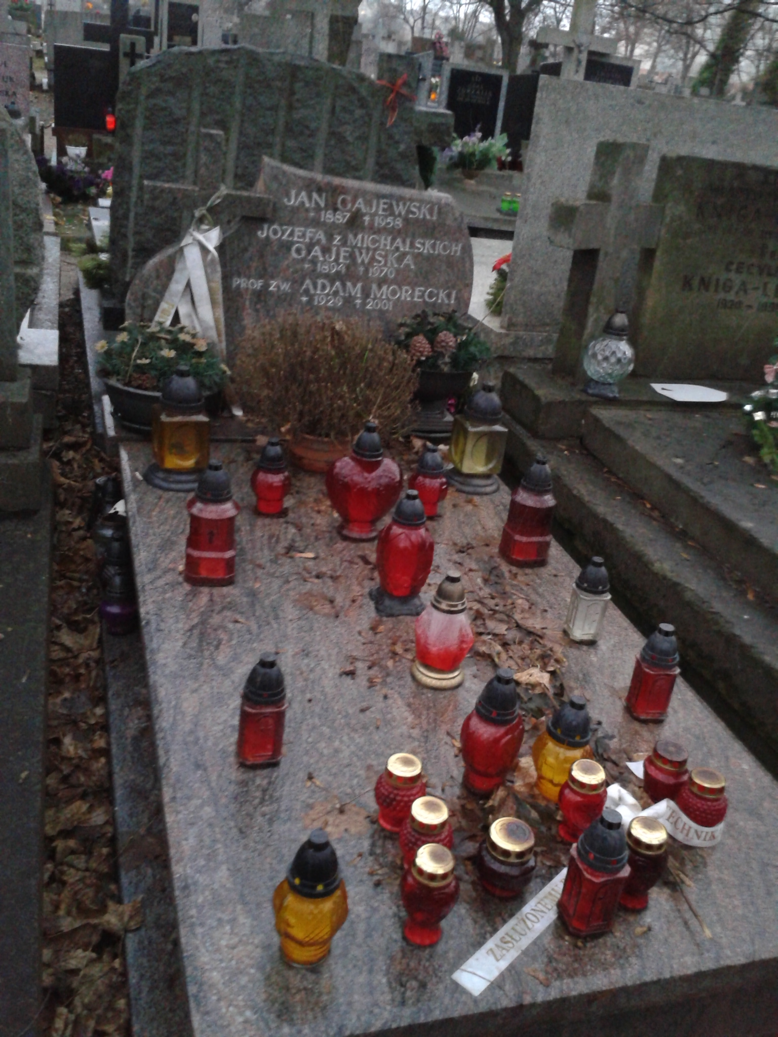 Grób rodzinny prof. Adama Moreckiego